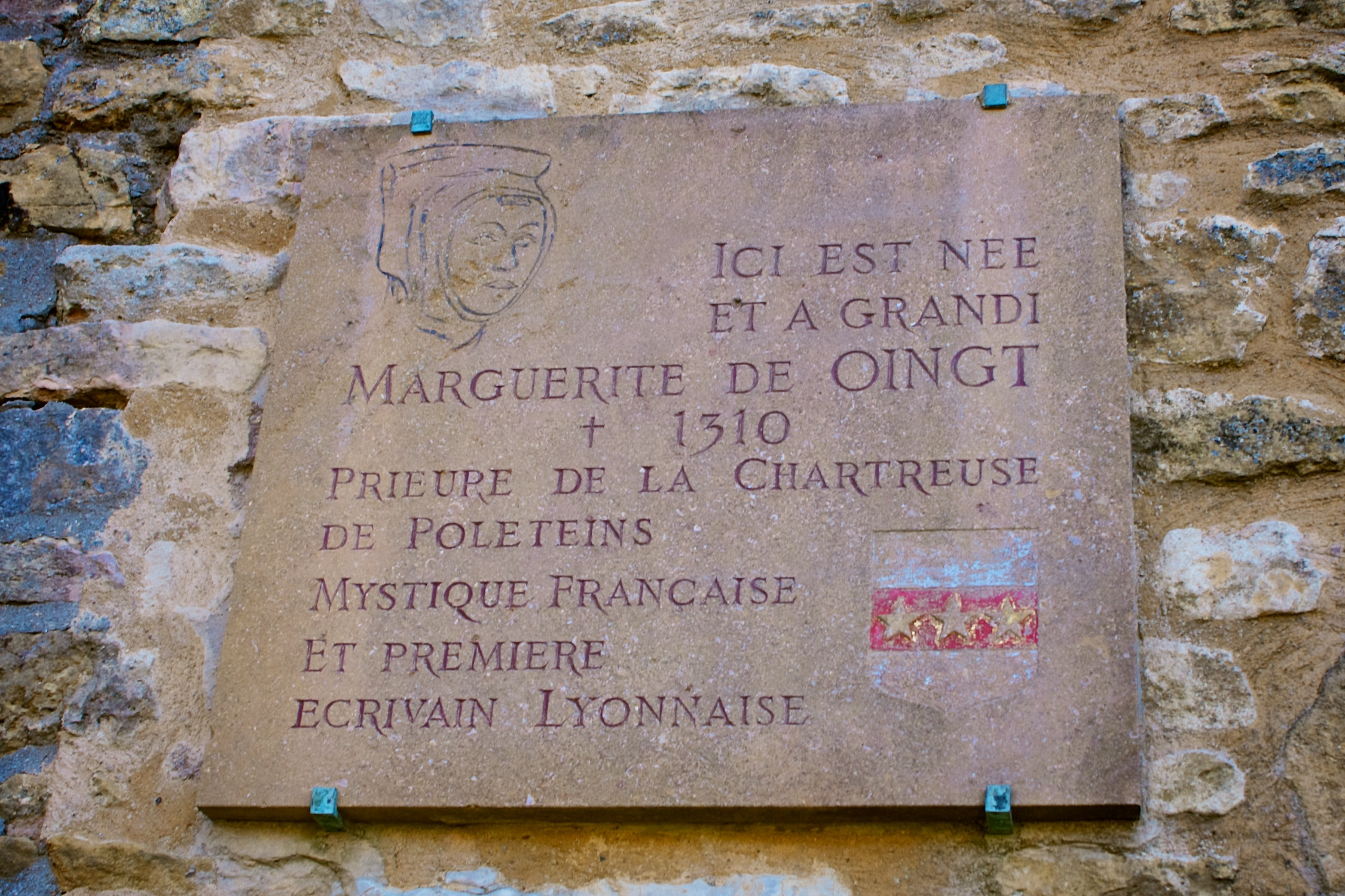 Plaque célébrant Marguerite de Oingt, à Oingt, dans le Beaujolais.